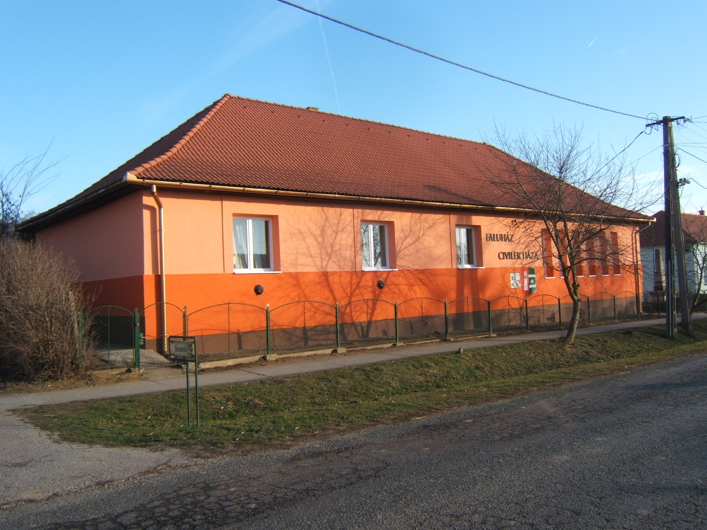 Somodor, faluház